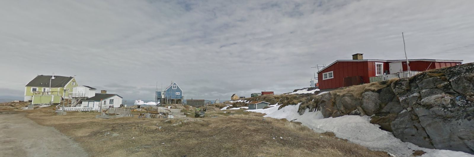 Ikamiut